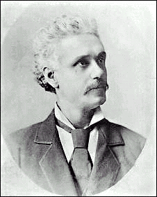 Arthur Buies (1840-1901), Journaliste et écrivain canadien